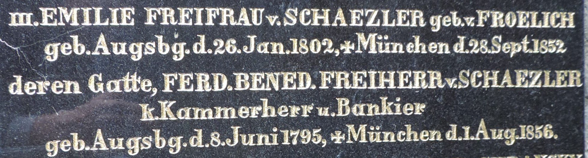 Grabplatte am Familiengrab derer von Schaezler